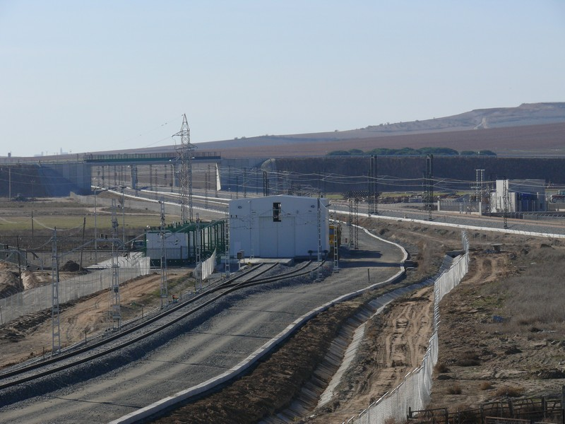 LAV Madrid - Valladolid (al fondo), con el cambiador de ancho dual de Valdestillas (Valladolid). La fotografía está tomada en sentido Madrid, con la vía en ancho ibérico que conduce hasta él en primer término, a la izquierda. La instalación del fondo derecho de la imagen es un centro autotransformador.